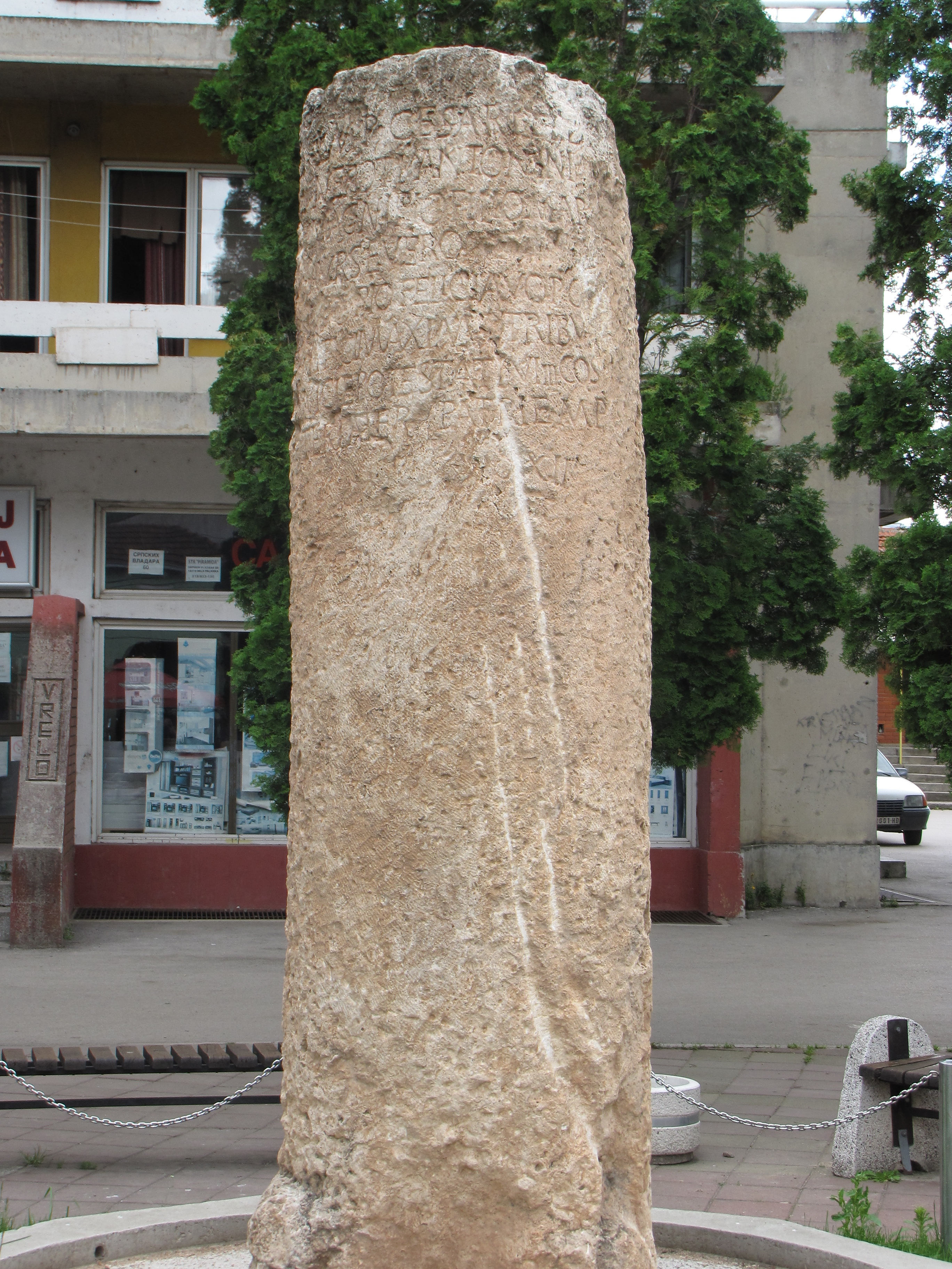 Rimski miljokaz u Beloj palanci